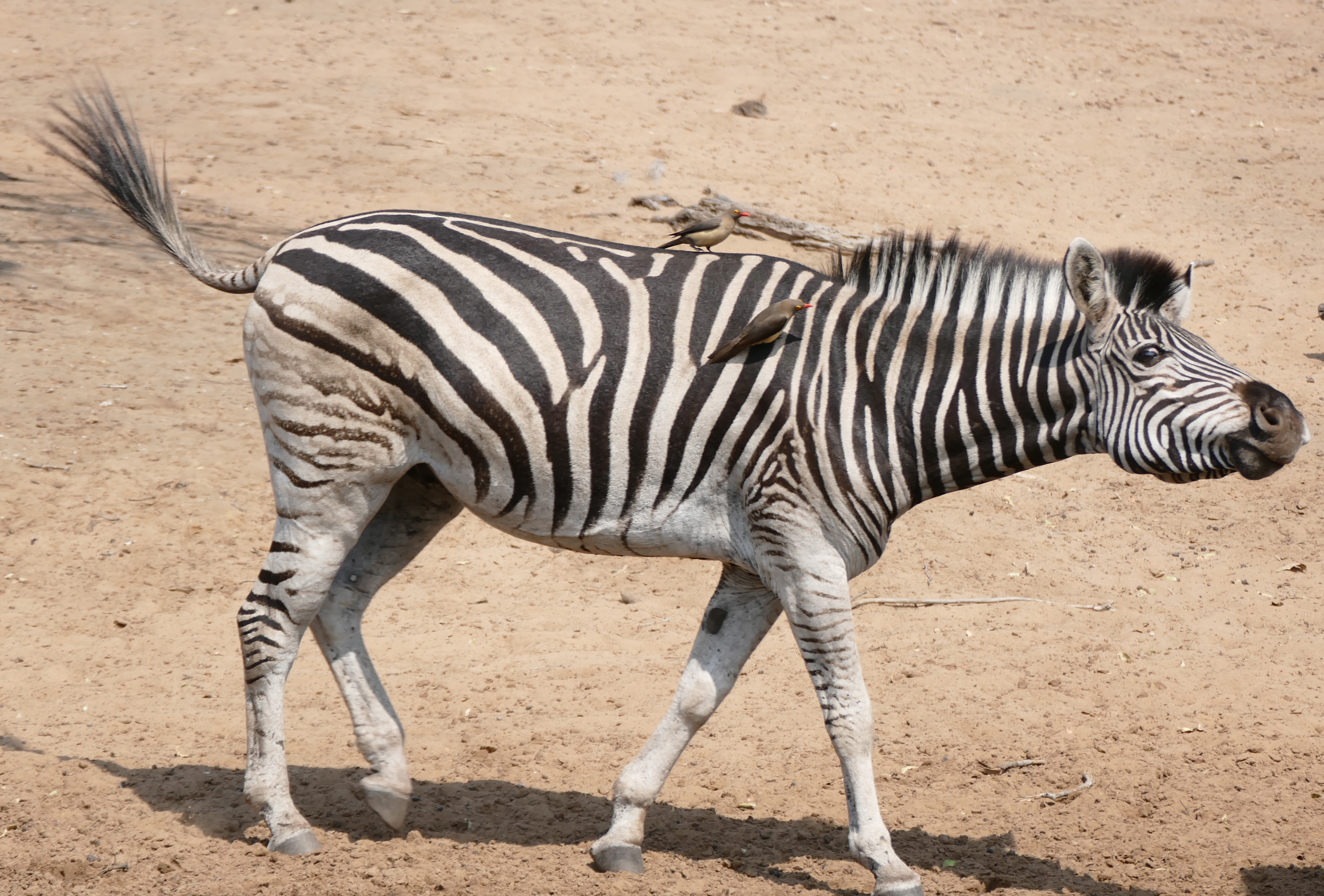 kuMasinga Hide, uMkhuze Game Reserve, Kwazulu-Natal, SOUTH AFRICA